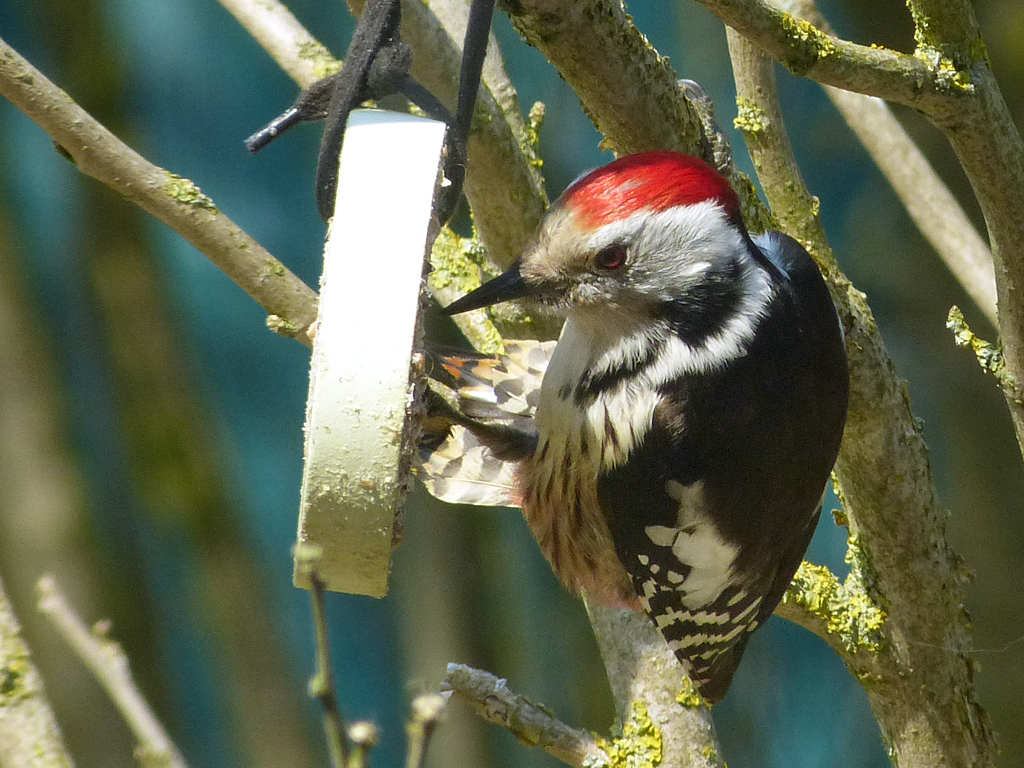 Mittelspecht an einem Meisenring, fotografiert im Garten, Mecklenburg, Rieps / Cronskamp